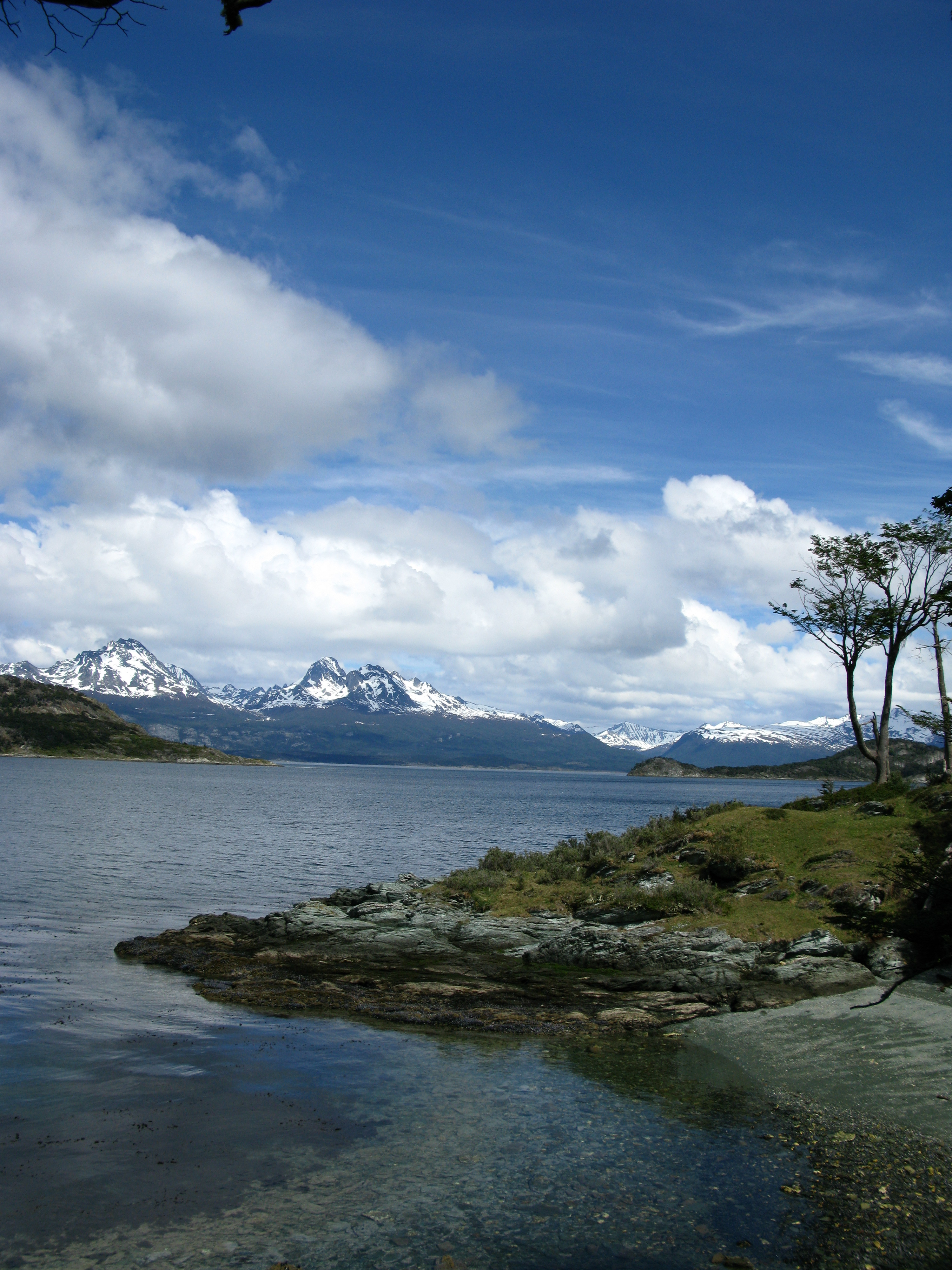 Parc national de terre de feu